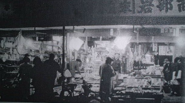 Japanese supermarket カネスエ (kanesue